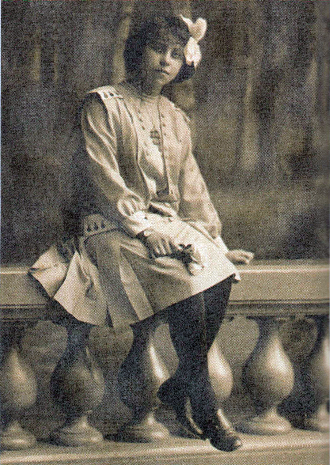 Photo d'Irène Némirovsky à l'âge de 16 ans, reproduite dans Irène Némirovsky, un destin en images, Olivier Corpet (dir.), Paris, Denoël, 2010.